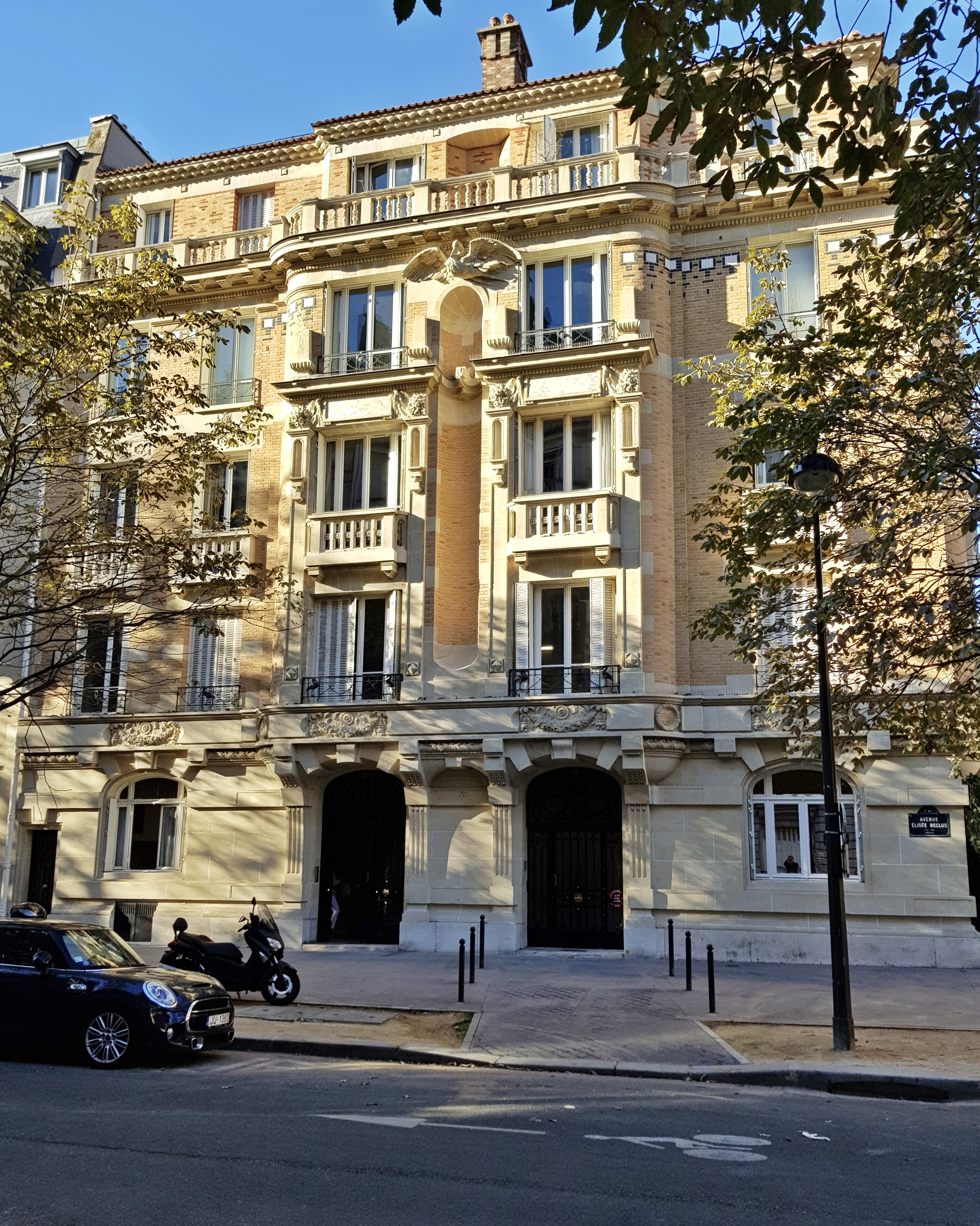 Immeuble du 12, avenue Elisée-Reclus, Paris 7e.